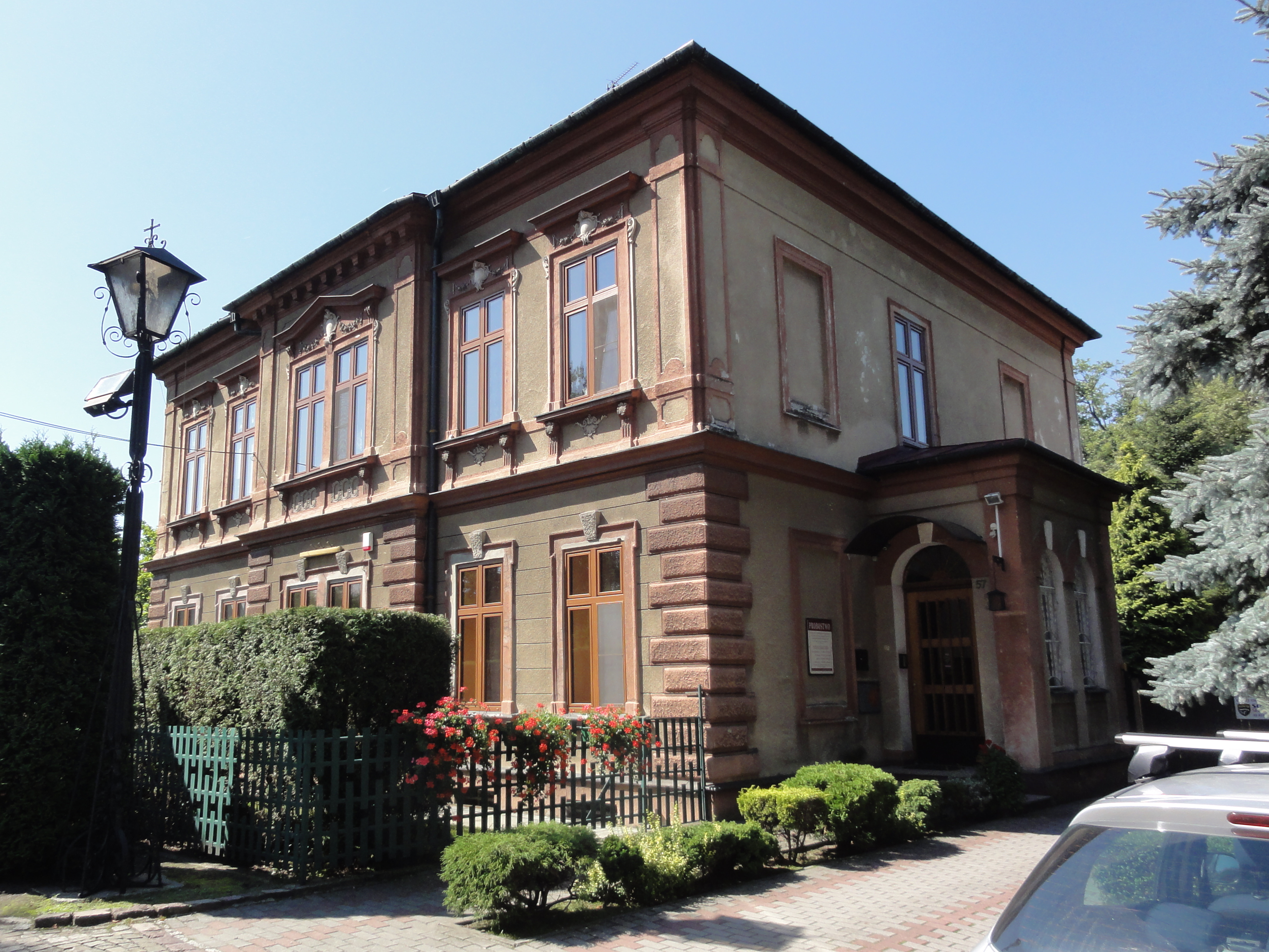 Probostwo NMP Wspomożenia Wiernych w Czechowicach-Dziedzicach